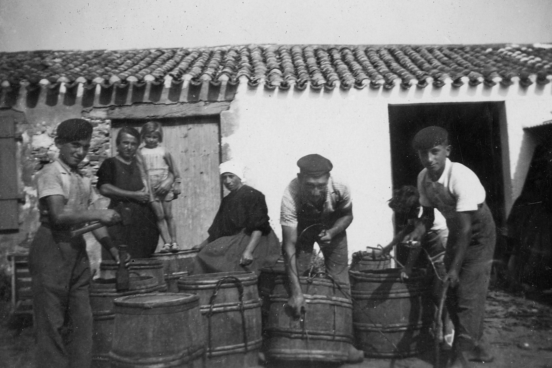 Vendanges à La Girvière, Olonne sur Mer, Vendée, dans les années 1940